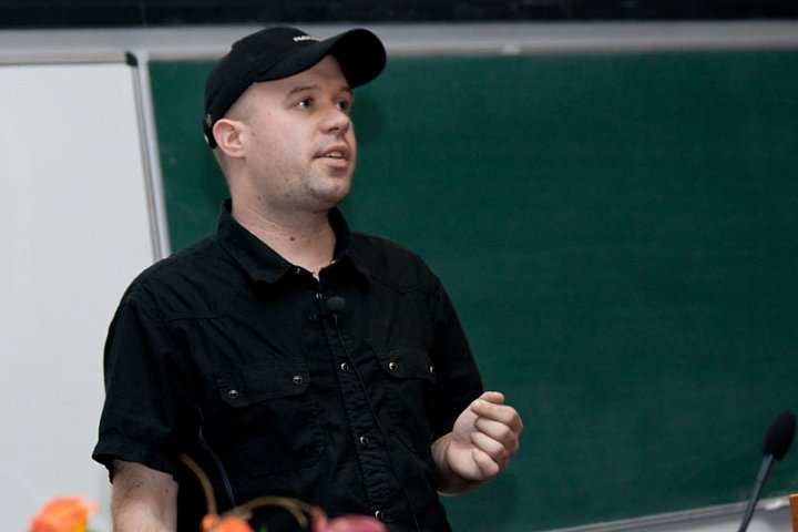 David Grudl na WebExpo 2000